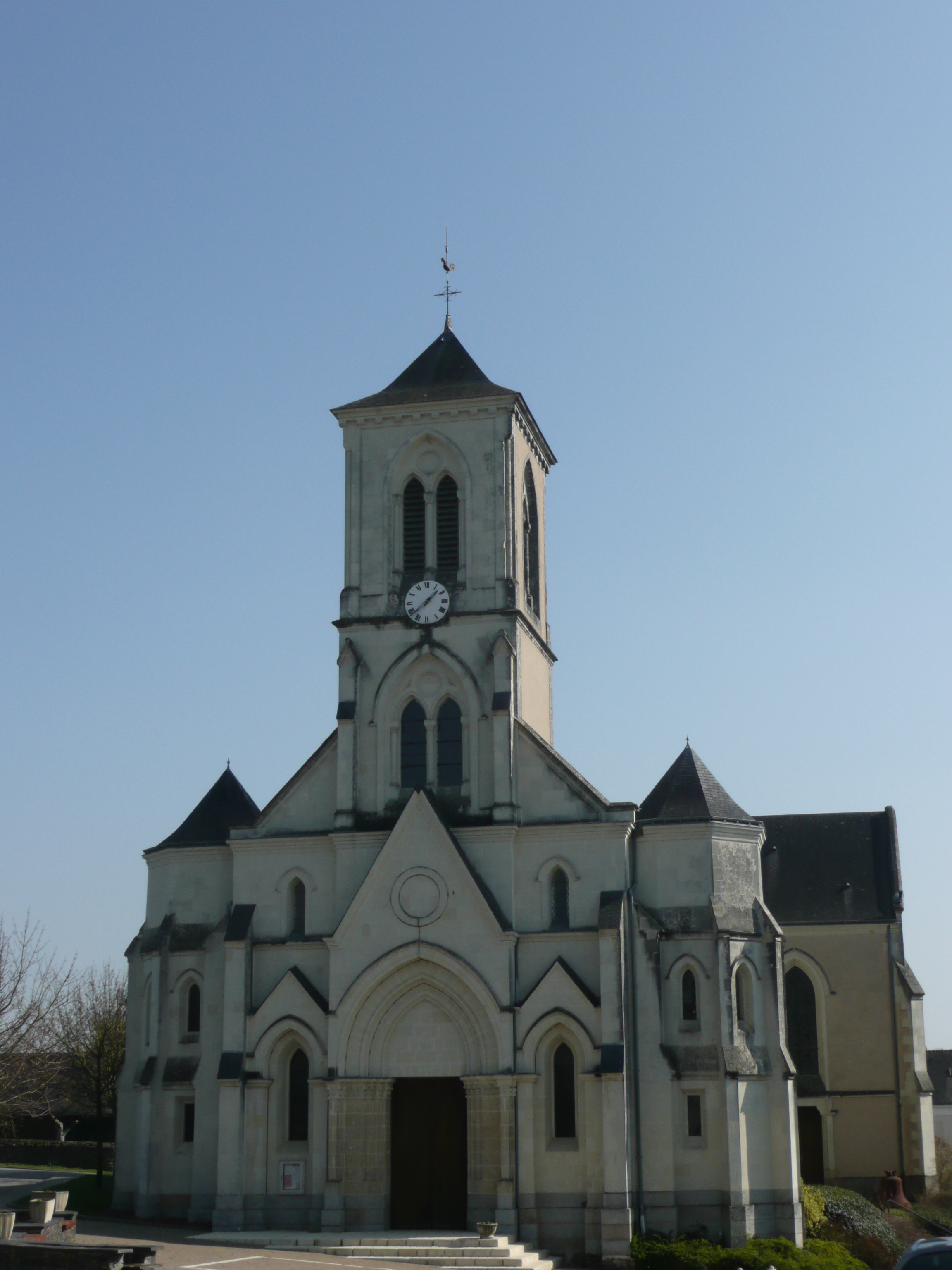 Eglise de Chazé-Henry